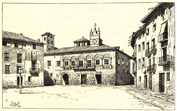 Ágreda. Plaza mayor y casa ayuntamiento.